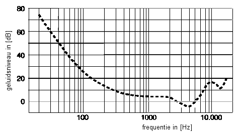 Gehoordrempel, eigen werk